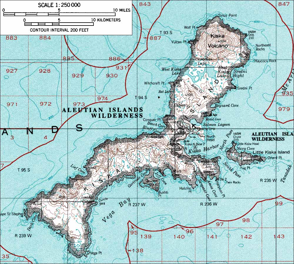 USGS map